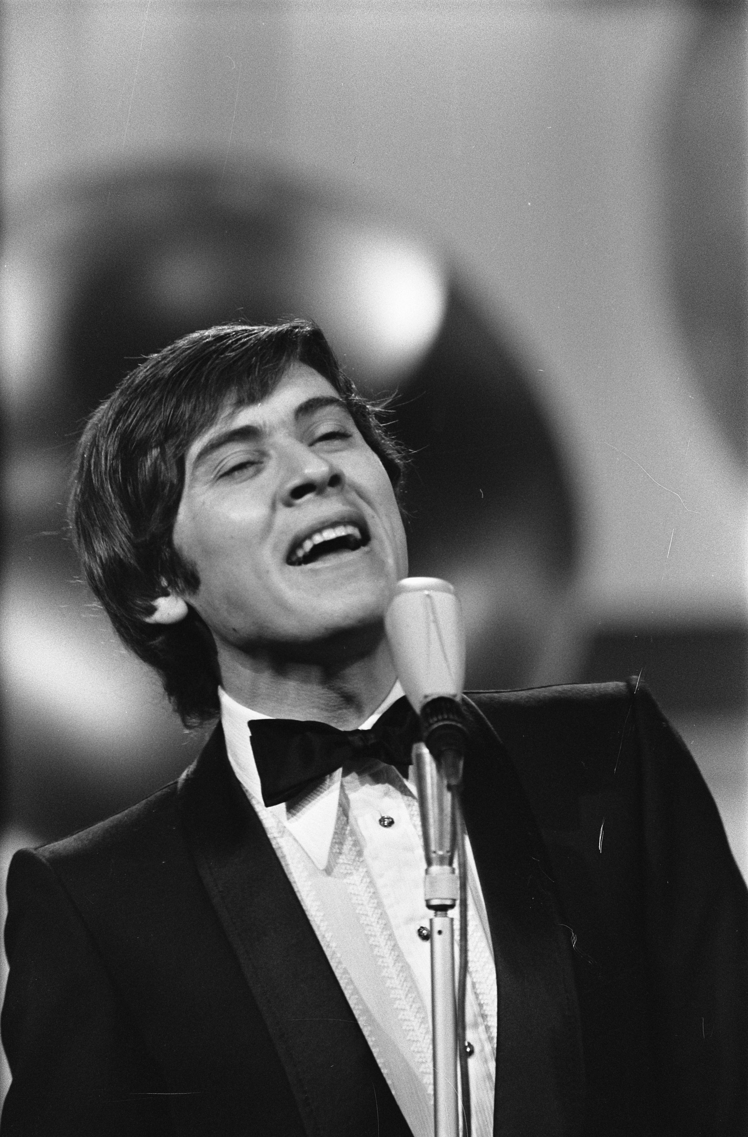 Collectie / Archief : Fotocollectie Anefo Reportage / Serie : Eurovisie Songfestival 1970 in RAI te Amsterdam Beschrijving : Gianni Morandi (Italie) Datum : 21 maart 1970 Locatie : Amsterdam Trefwoorden : artiesten, songfestivals, zangers Persoonsnaam : Morandi, Gianni Instellingsnaam : Eurovisie Song Festival Fotograaf : Koch, Eric / Anefo Auteursrechthebbende : Nationaal Archief Materiaalsoort : Negatief (zwart/wit) Nummer archiefinventaris : bekijk toegang 2.24.01.05 Bestanddeelnummer : 923-3708